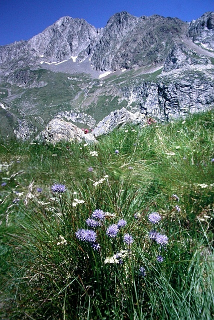 Photo de ??? prise avec une demi-bonnette de 2 dioptries.